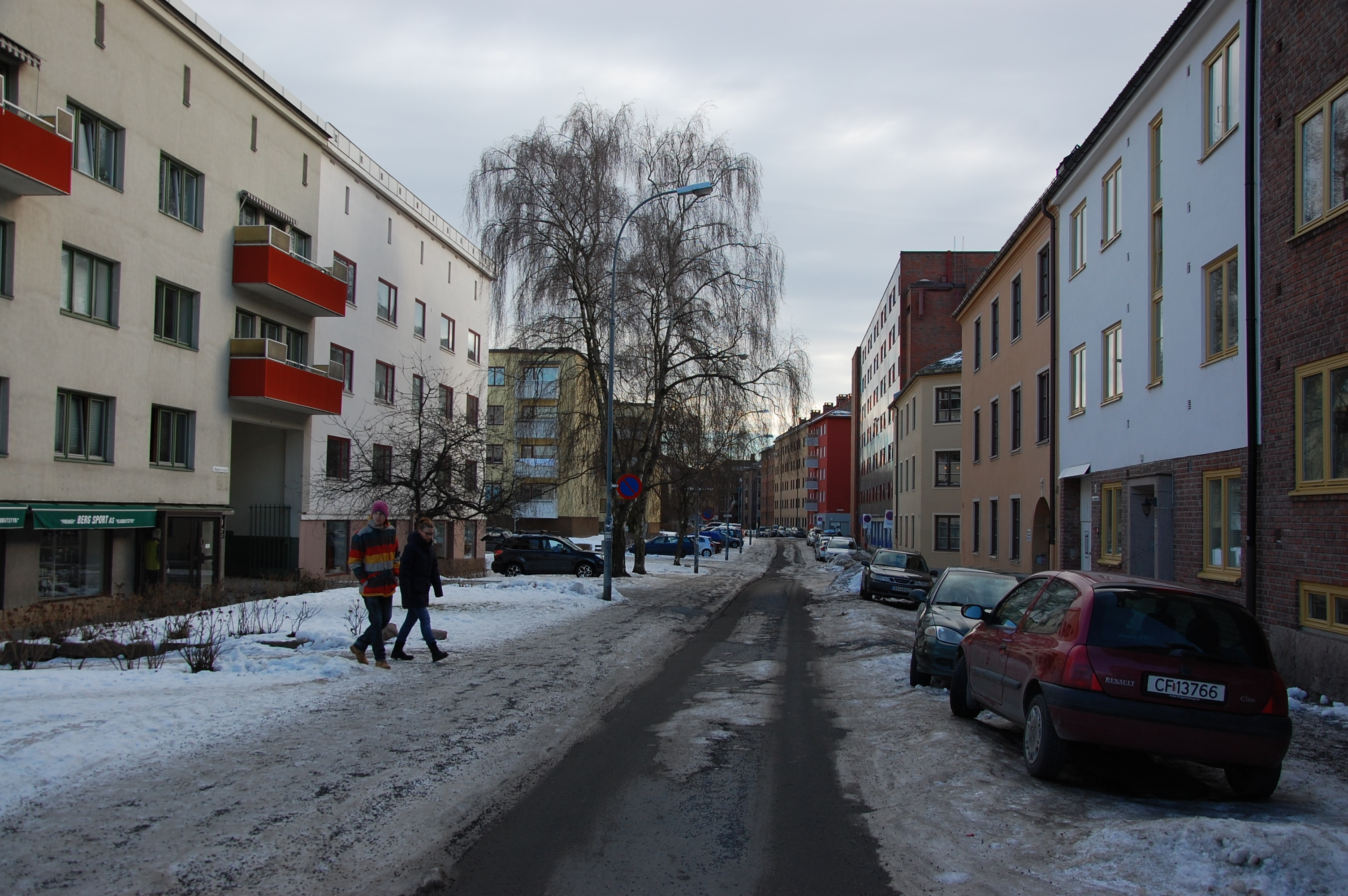 Mogata sett fra Sandefjordgata i retning Maridalsveien